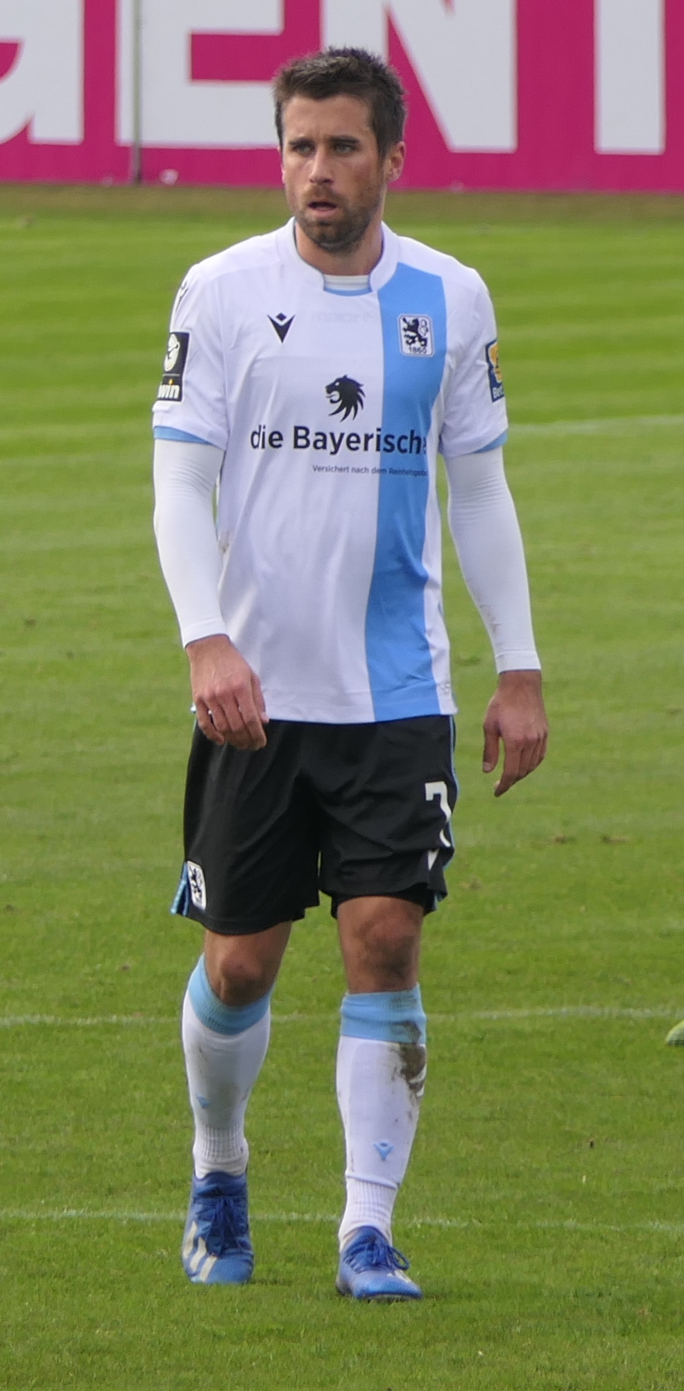 Der Fussballprofi Stefan Lex im Trikot vom TSV 1860 München beim Heimspiel gegen Eintracht Braunschweig am 26.01.2020.